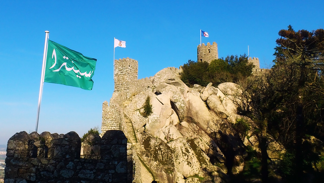 Синтра | Мавританская крепость